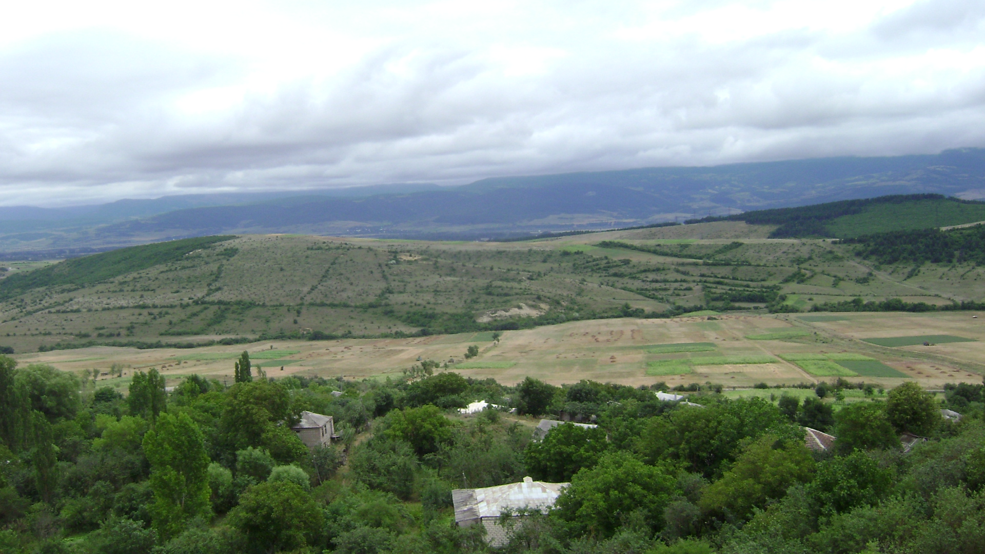 მდინარე ტილიანას ხეობა სოფელ ქემფერთან